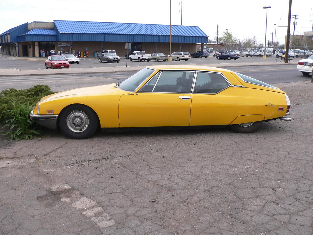 Citroen SM 1